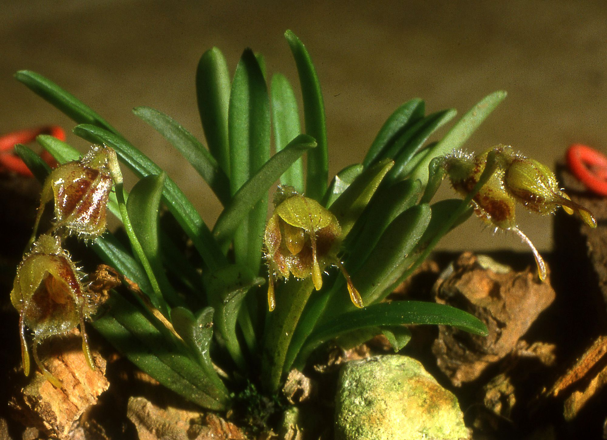 Diodonopsis erinacea